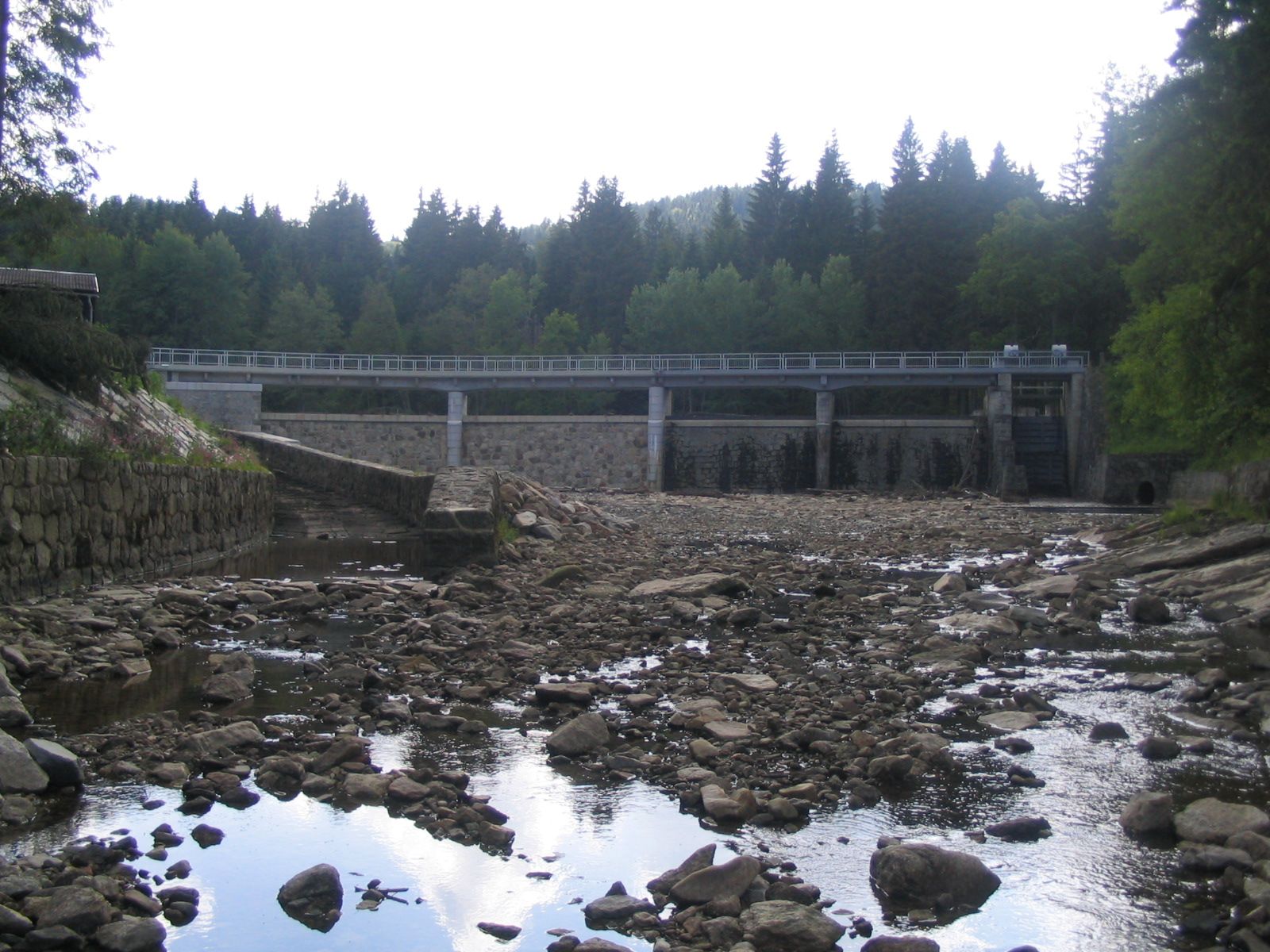 Přehrada Soběnov